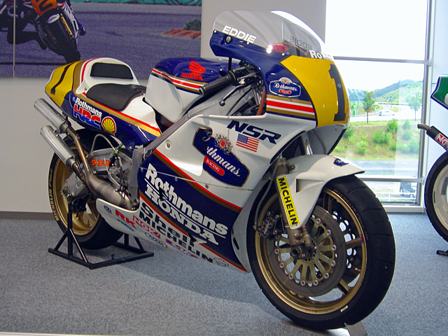 ホンダ・NSR500 撮影者がホンダ・コレクションホールにて撮影・編集、2006年9月21日に利用者:mercy758に委託したものをアップロード。